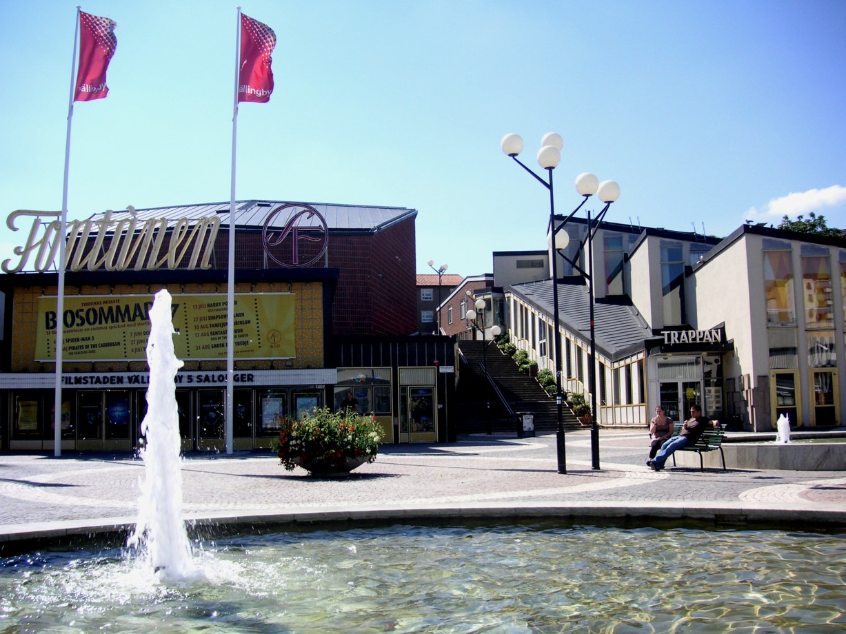 Vällingby Centrum